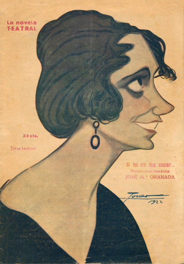 Caricatura de Julia Pacello.